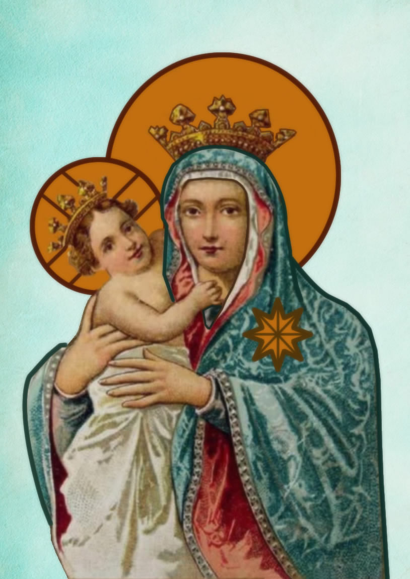 Madonna delle Scuole Pie di Frascati